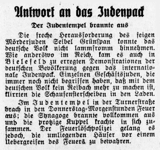 Pogromnacht 1938 in Bielefeld. Zeitungsbericht Westfälische Neueste Nachrichten 11.11.1938